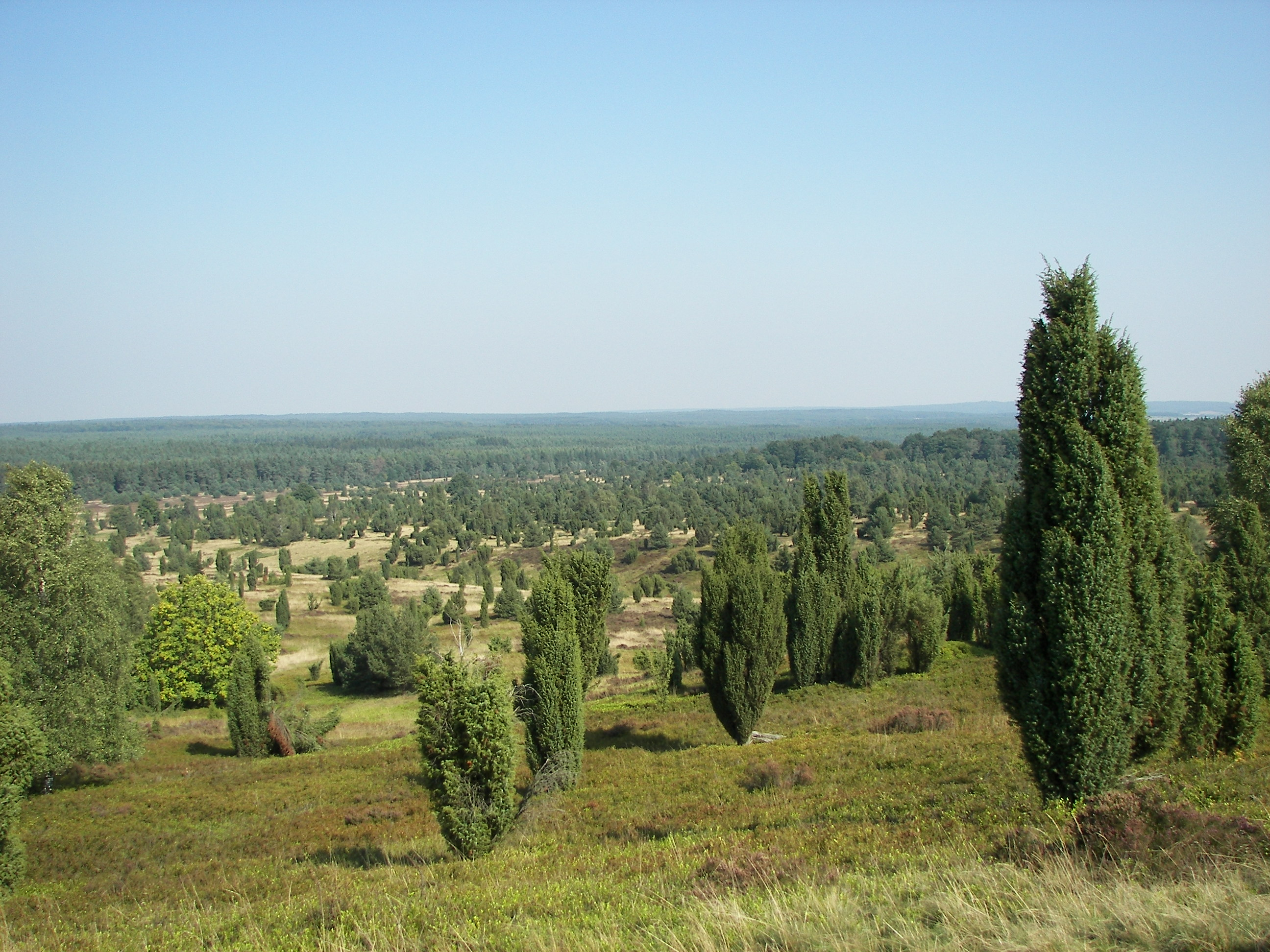 Blick vom Wilseder Berg, Heidelbeer-Sandheide